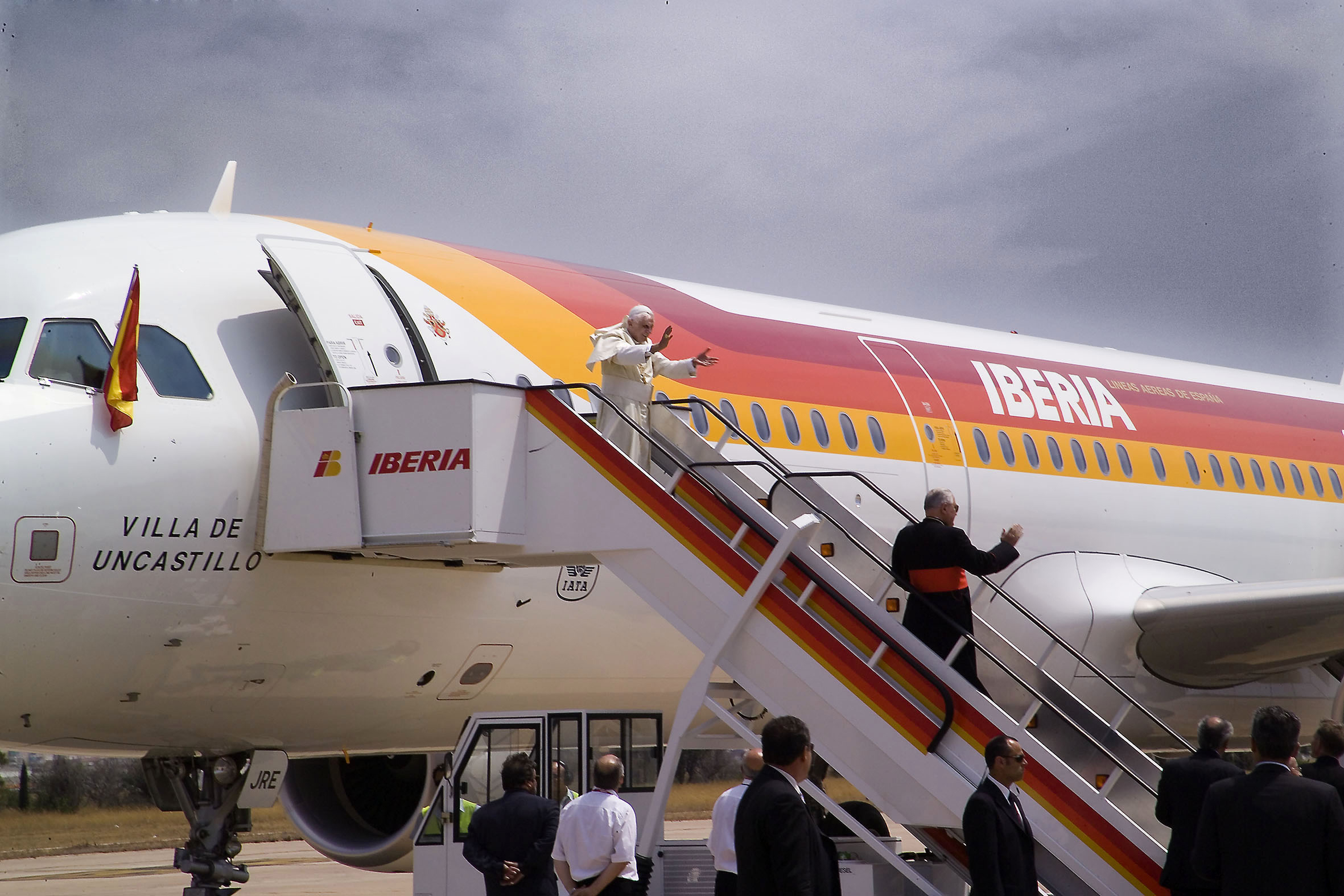 Benedicto XVI vino por primera vez a España, en 2006, para participar en el V Encuentro Mundial de las Familias. Aquí a su llegada al aeropuerto de Valencia. Pope Benedict XVI upon arrival in Valencia, coming to Spain for the first time in 2006 to attend the 5th World Families Meeting. Il Papa Benedetto XVI per la prima volta in Spagna, nel 2006, per partecipare al V incontro mondiale delle Famiglie. Nella foto l'arrivo all'aereoporto di Valenzia Der Papst, Benedikt XVI kam nach Spanien zum ersten mal 2006 um V. Welttreffen der Familien teilzunehmen. Hier bei der Ankunft am Flughafen in Valencia.